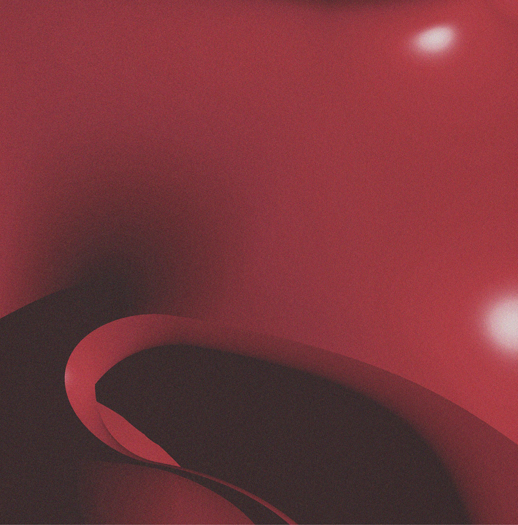 पाली pālī: Jaroslava Severova Detail Noise1 Digital Print